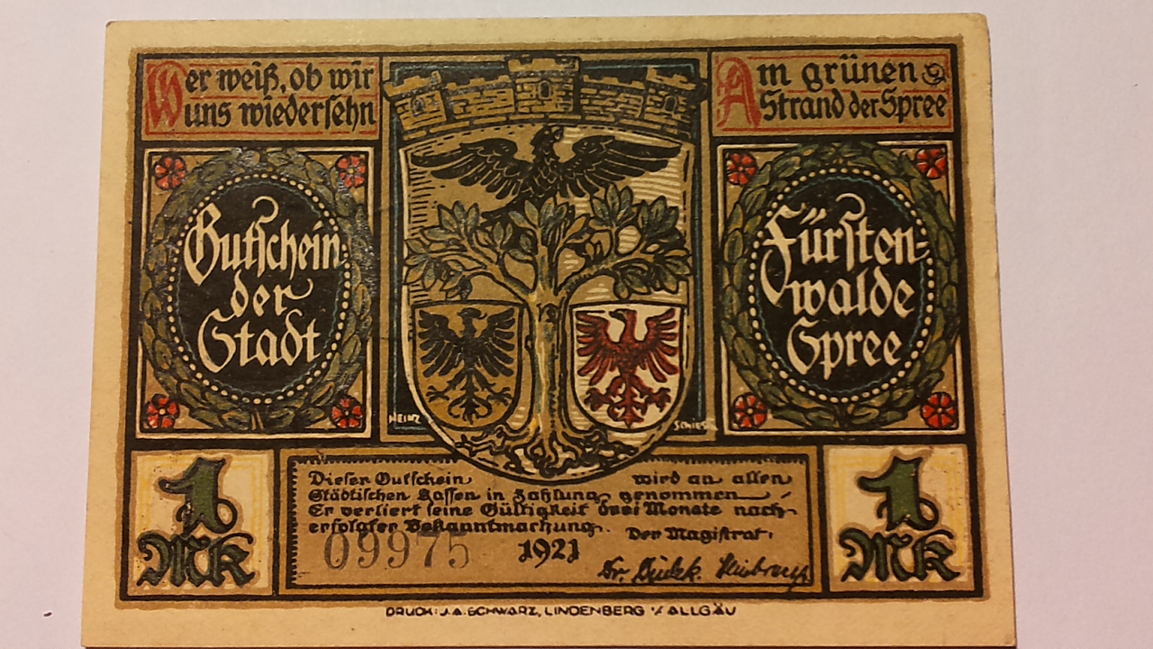 Rückseite des Wertpapiers